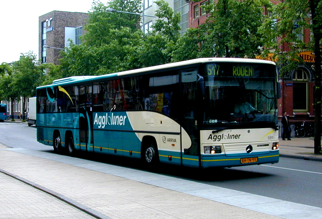 Arriva bus 5811 van het type Mercedes-Benz Integro als Aggloliner 517 bij de halte Gedempte Zuiderdiep te Groningen.